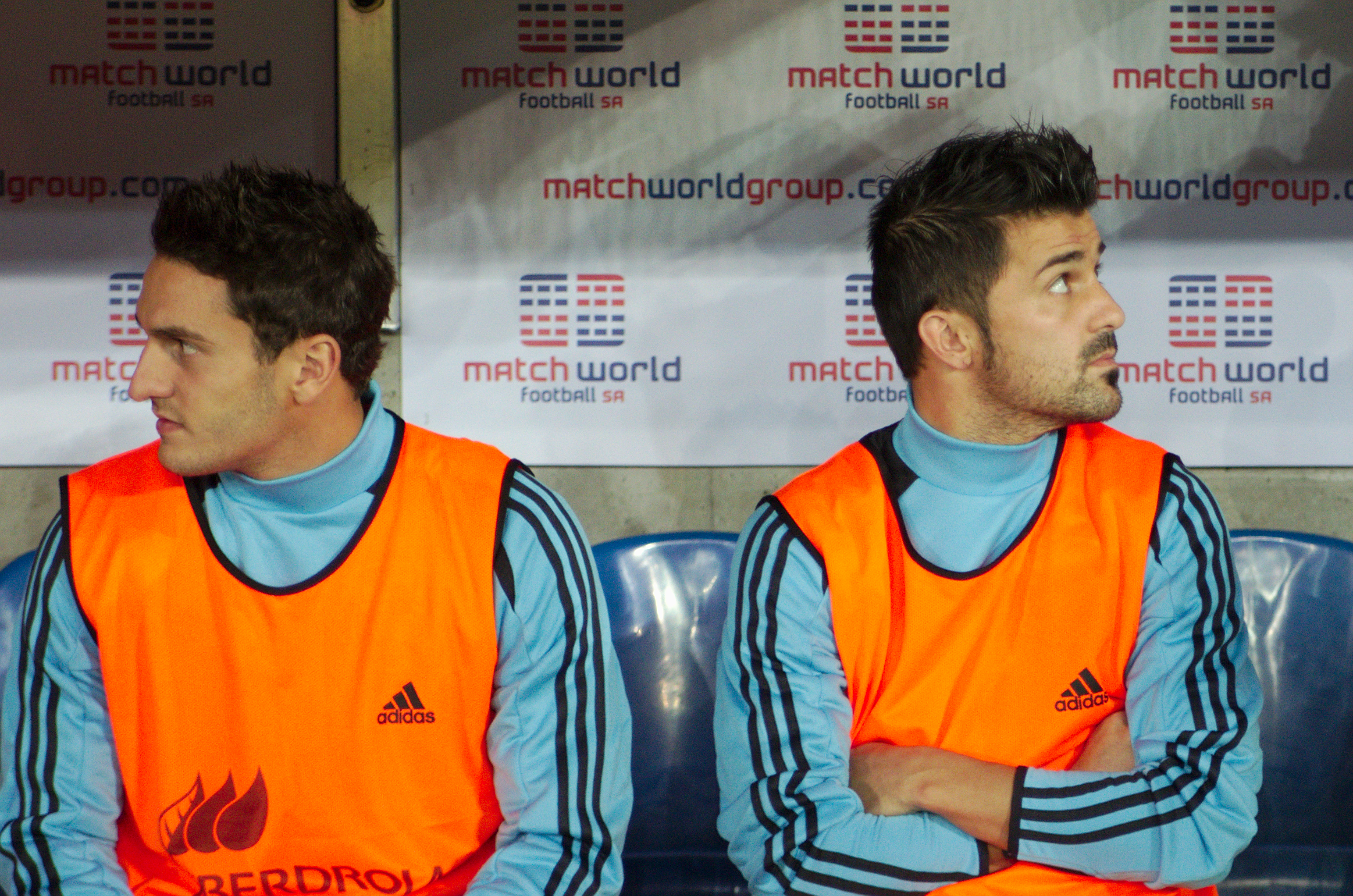 Spain - Chile - 10-09-2013 - Geneva - Koke and David Villa